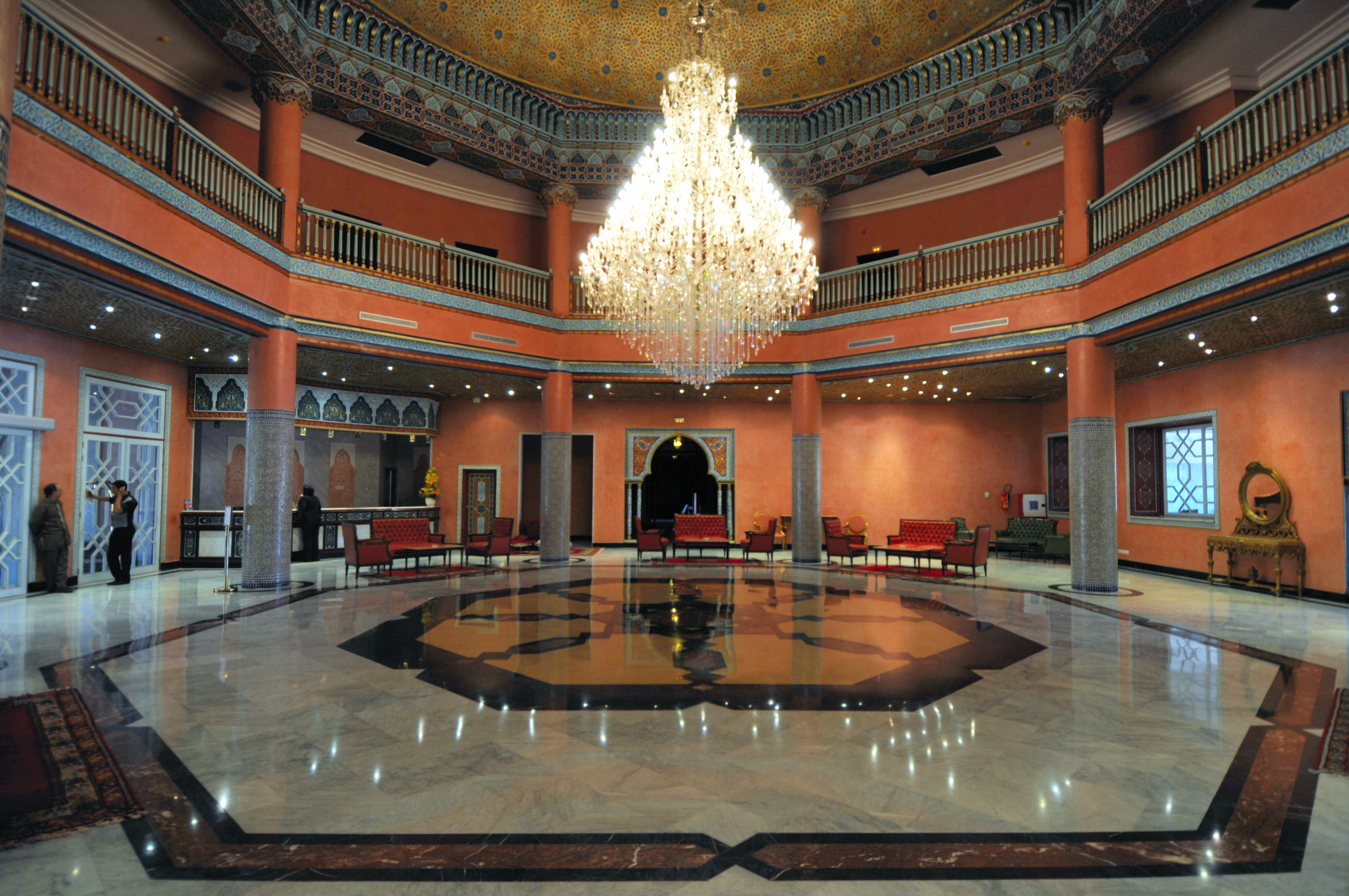 Hotel Marrakch Maroc